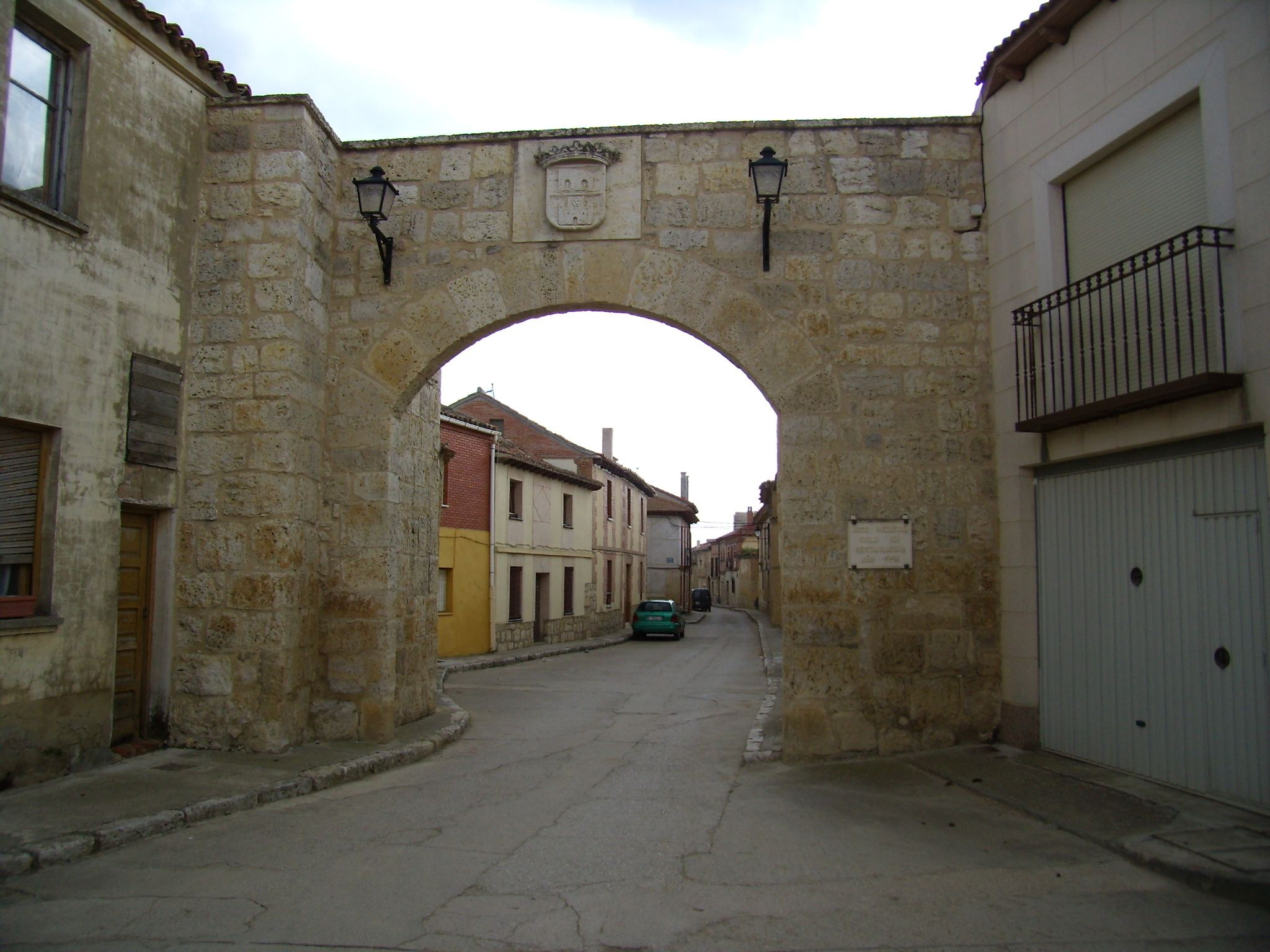 Puerta de Muralla en Fuentes de Valdepero (Palencia, España).